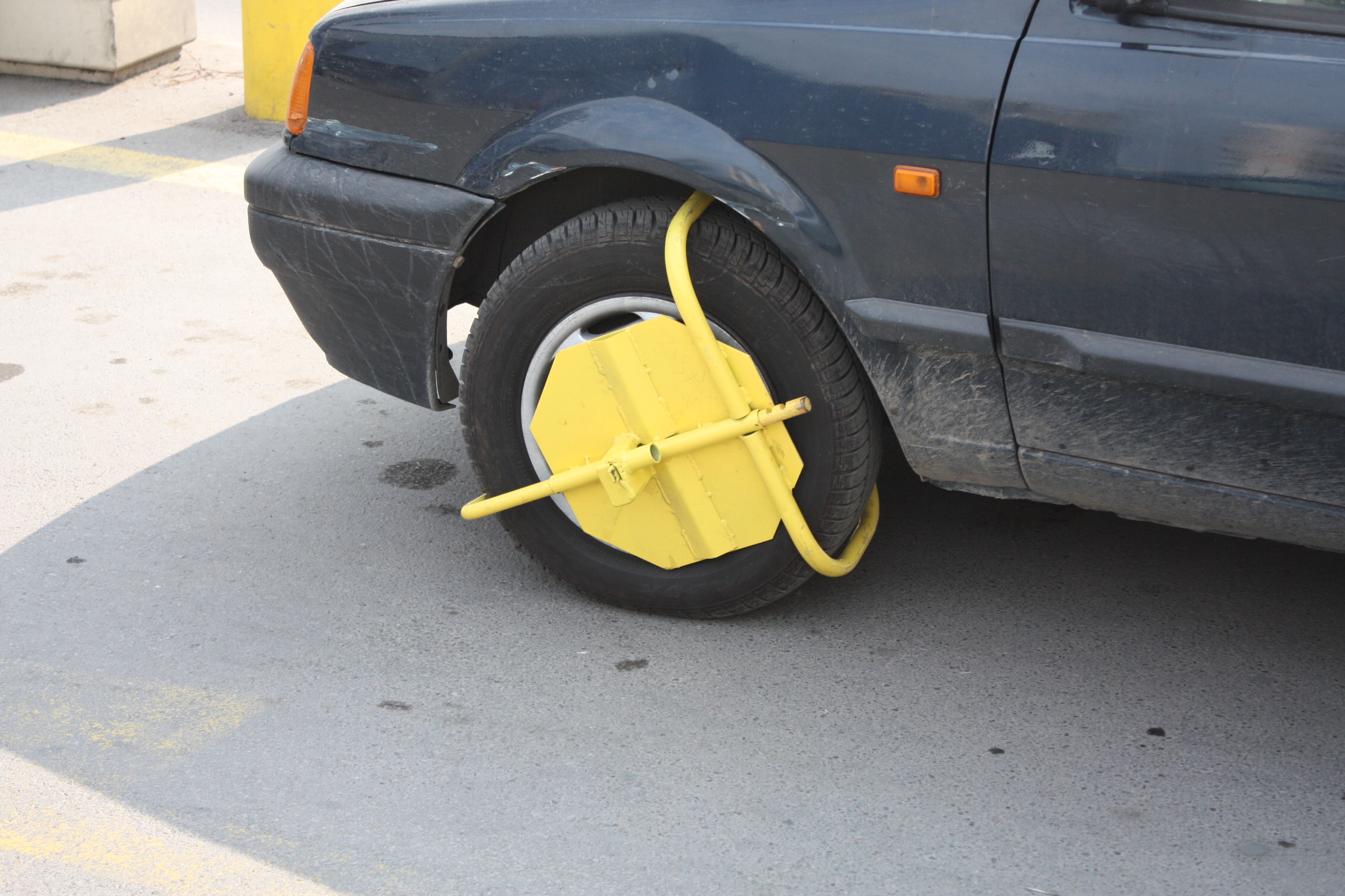 Wheel clamps, Verkehrskralle, Reifenkralle, Sofia, Bulgarien